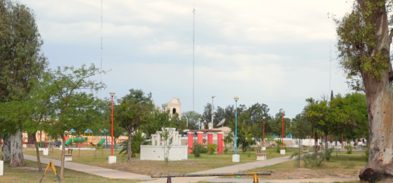 Plaza de San Pedro de Guasayán